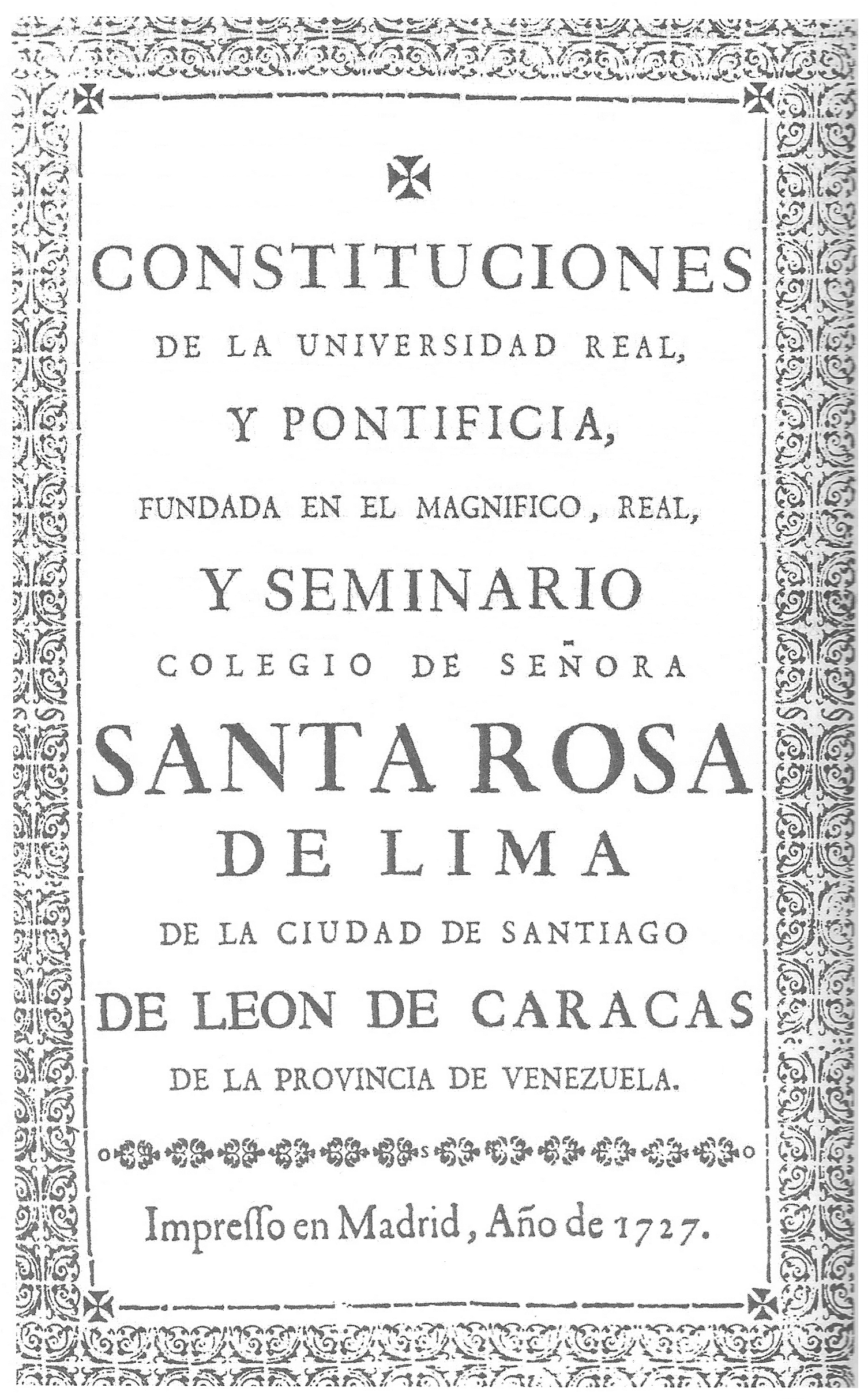 "Constituciones de la Universidad Real, y Pontificia, fundada en el magnífico, real, y seminario Colegio de Señora Santa Rosa de Lima de la Ciudad de Santiago de Caracas de la provincia de Venezuela. Impresso en Madrid, Año de 1727."